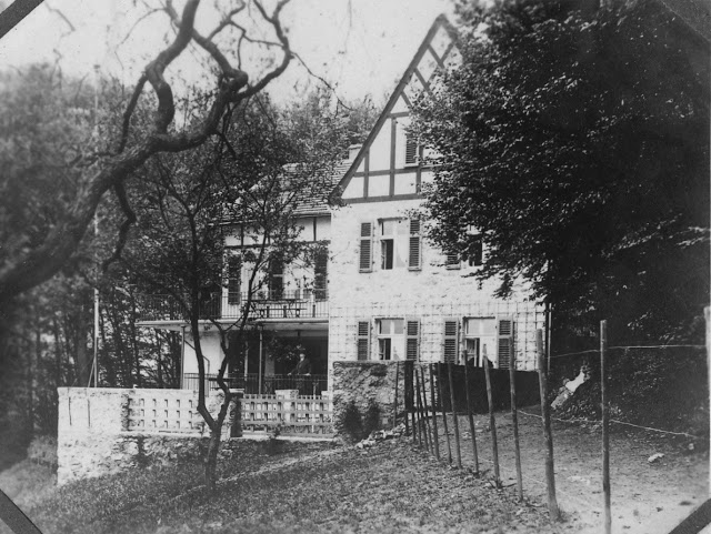 Haus Rüdenet, Königswinter: Ansicht von Süden